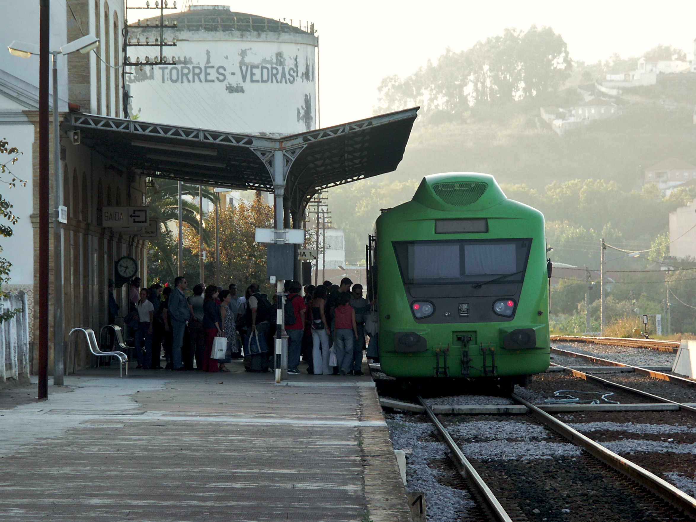 Tipo: Comboio Regional 6413 [Cacém - Caldas da Rainha] Local: Estação de Torres Vedras [Linha do Oeste , PK 64] Data e hora: 21 de Setembro de 2004 [18h44] Material: Automotora 03xx [Unidade Simples Diesel - Allan Renovada]